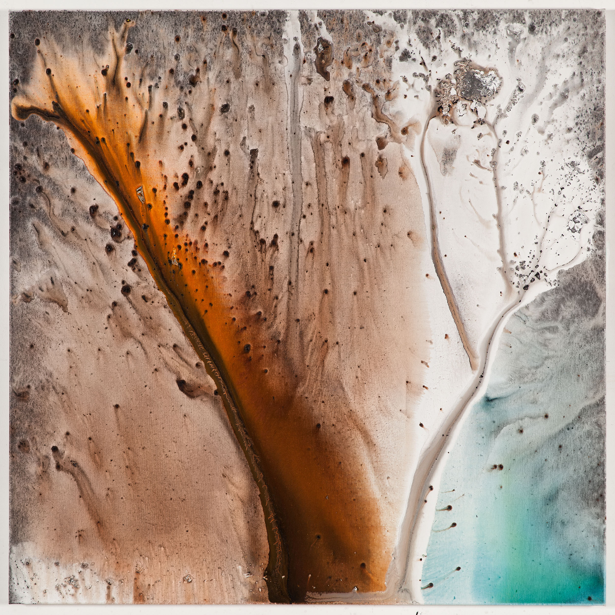 Untitled 37, 2017